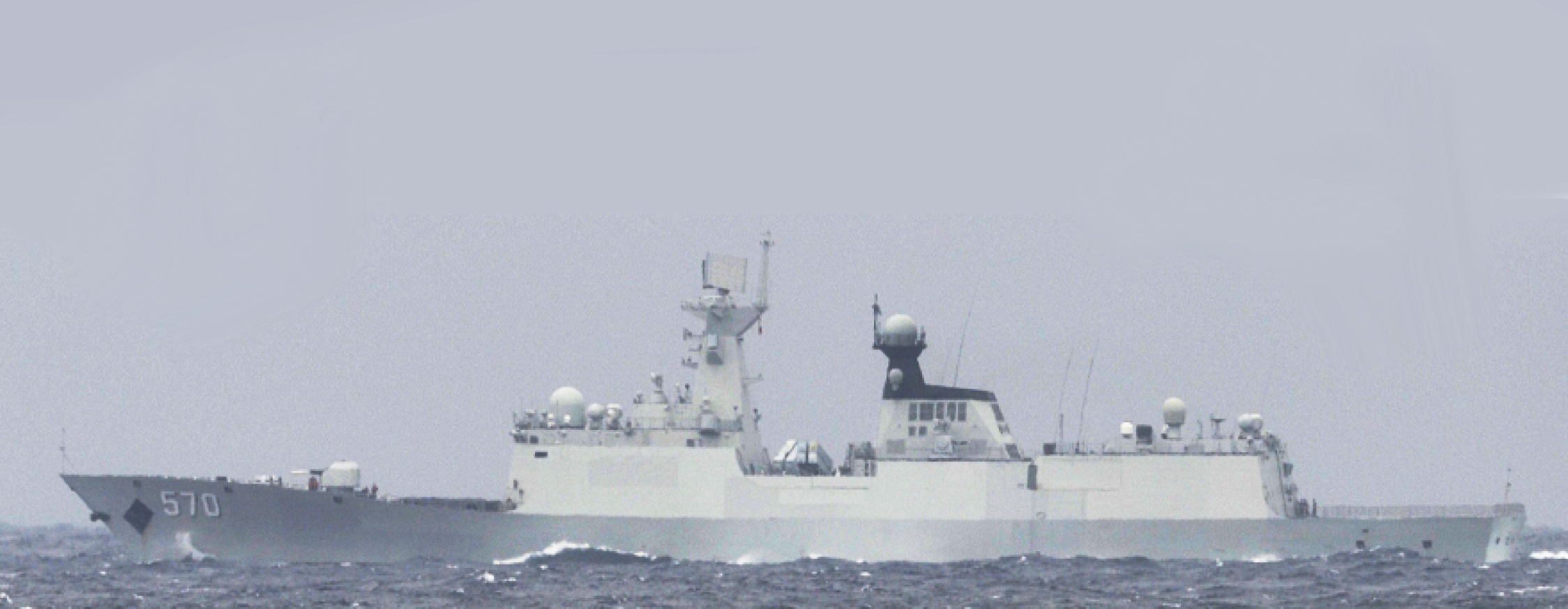 １２月２３日（月）午前２時頃、海上自衛隊第１１護衛隊「やまぎり」（横須賀）が、沖縄島の南西約６００ｋｍの太平洋上を東進する中国海軍ジャンカイⅡ級フリゲート２隻及びフチ級補給艦１隻の合計３隻を確認した。